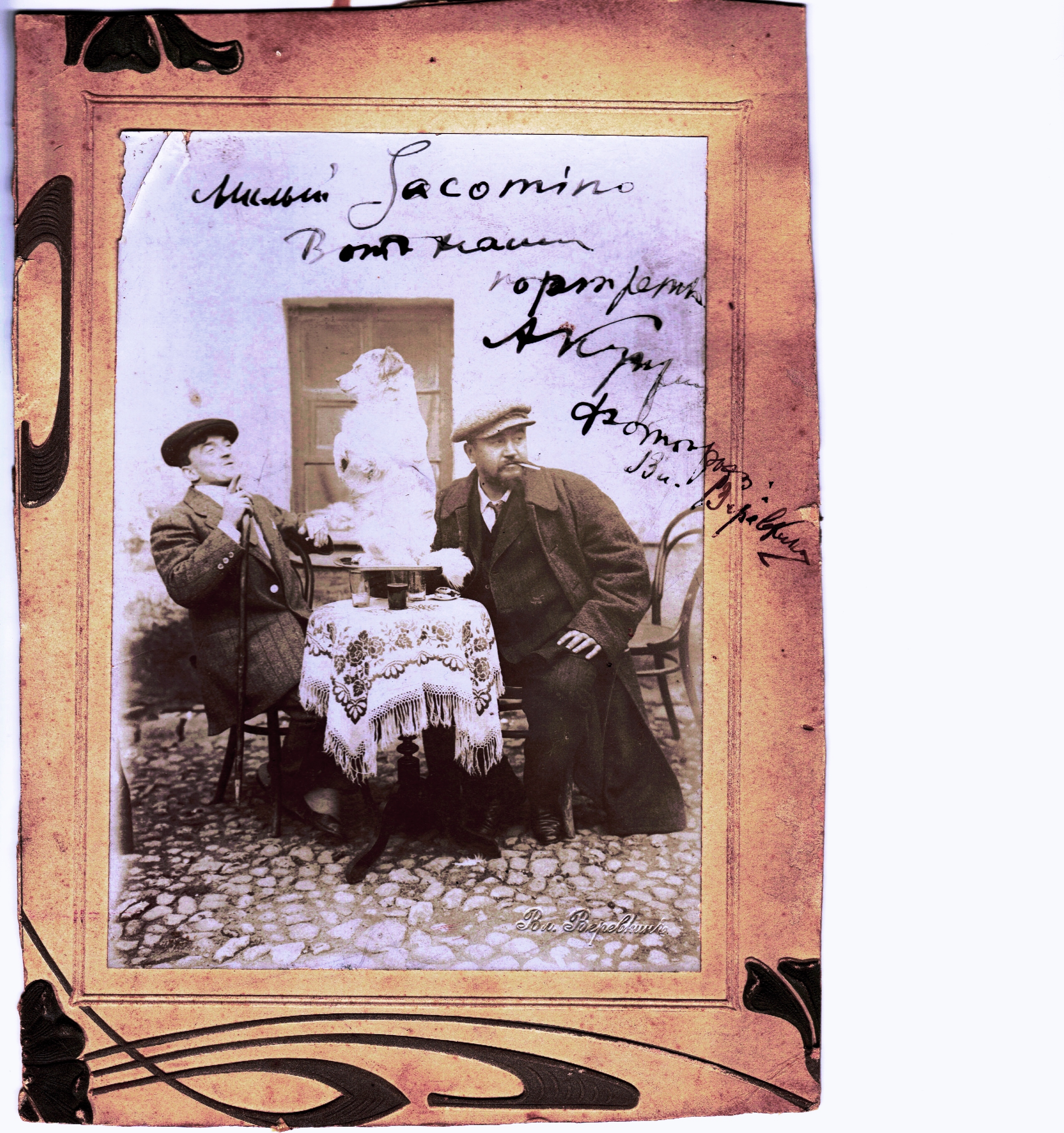 Foto di Giacomino e Kuprin